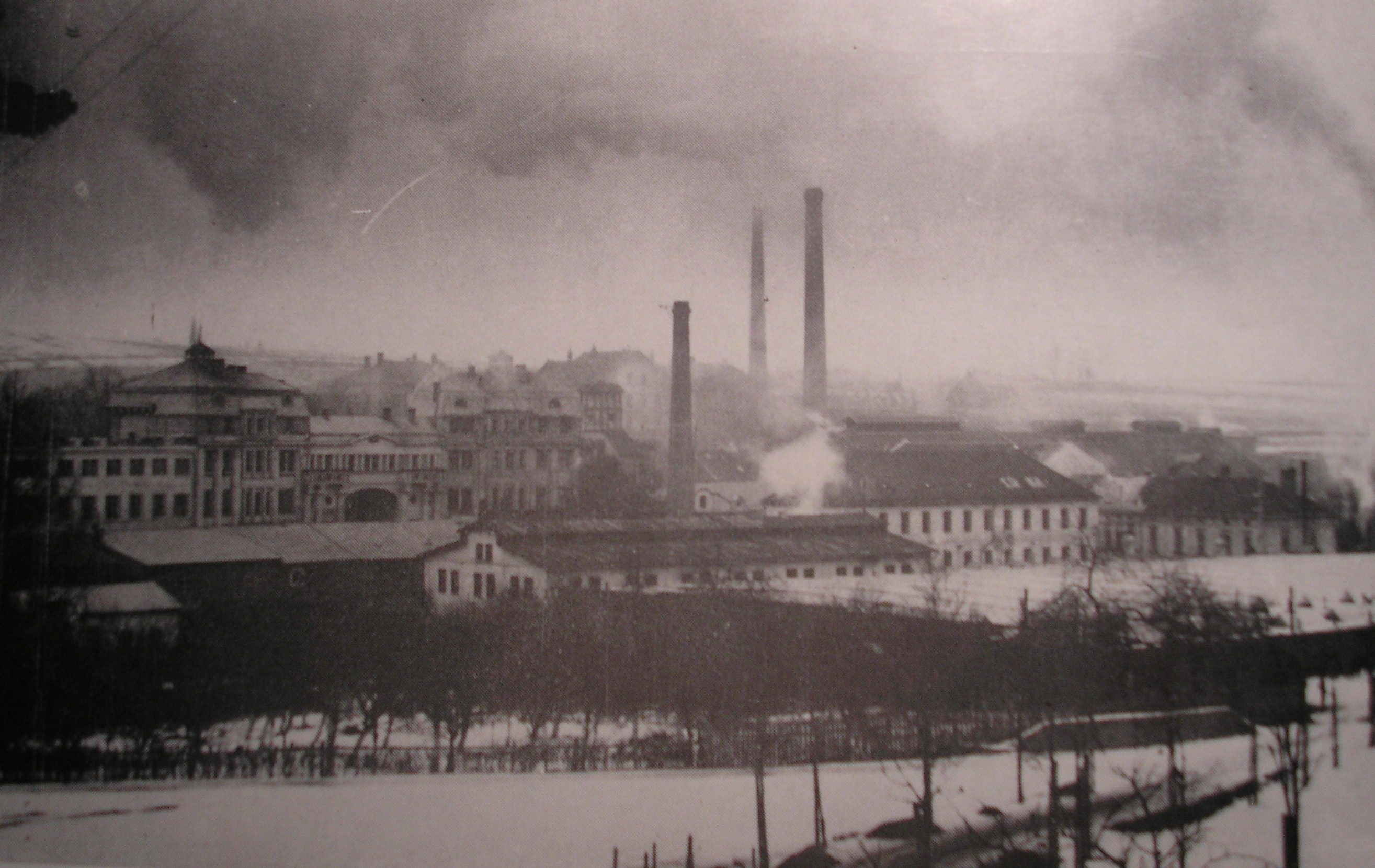 Areál třebíčské společnosti Carl Budischowsky & Söhne (BOPO) před rokem 1900